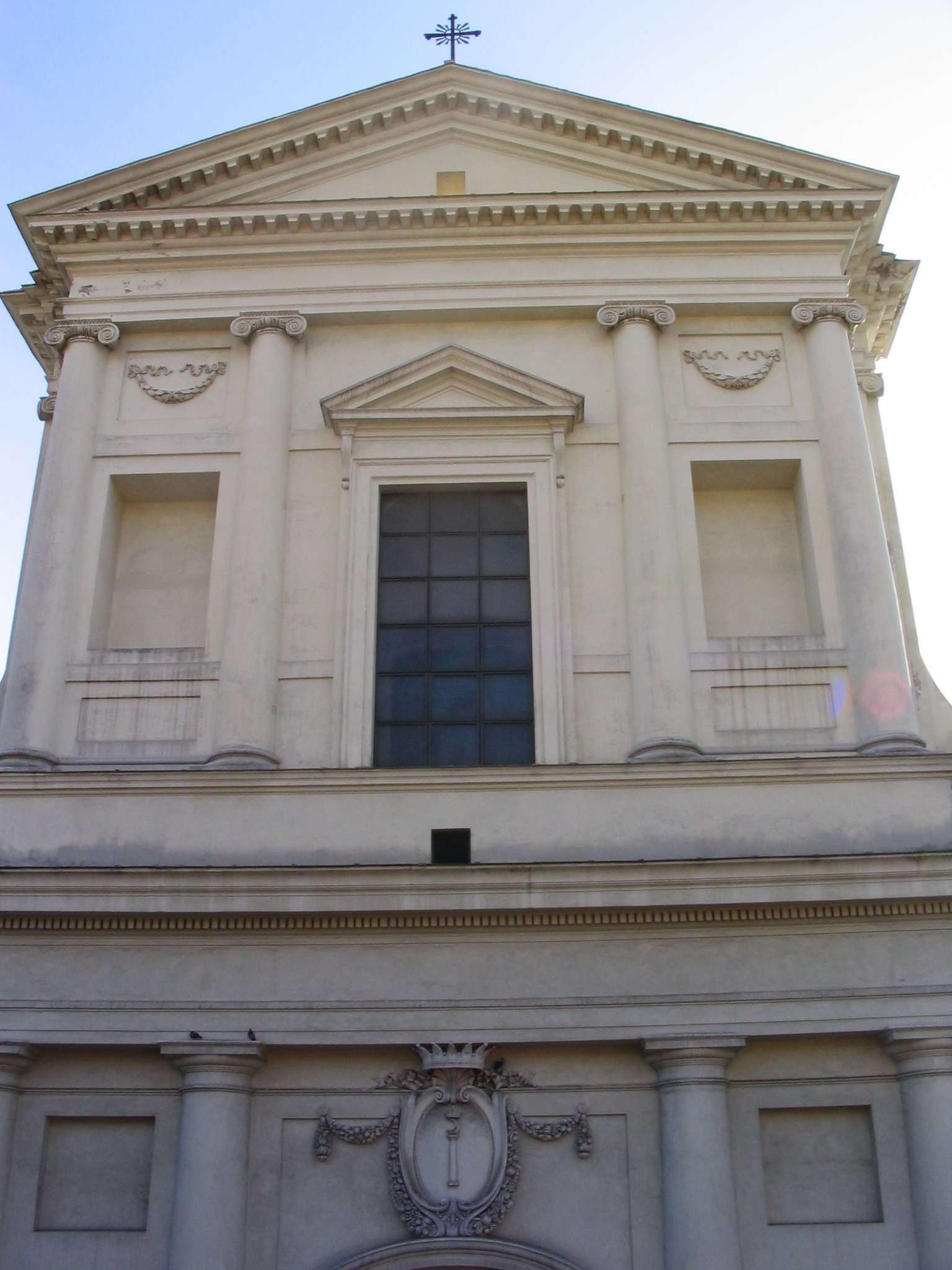 Genzano di Roma, Collegiata della Santissima Trinità, ovvero San Tommaso da Villanova, Particolare della facciata